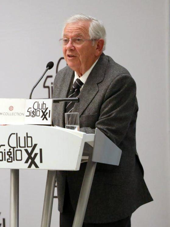 La alcaldesa de Madrid, Manuela Carmena, señaló ayer en el Club Siglo XXI durante la presentación del libro de Fernándo Jaúregui, ‘Los abogados que cambiaron España’, que el Derecho debe tener una serie de características para que sea de calidad: “El Derecho cumple su papel si es razonable, si no es burocrático, si es humano, comprensible y si es aceptado, pero la prueba de su calidad es si las leyes se cumplen”.